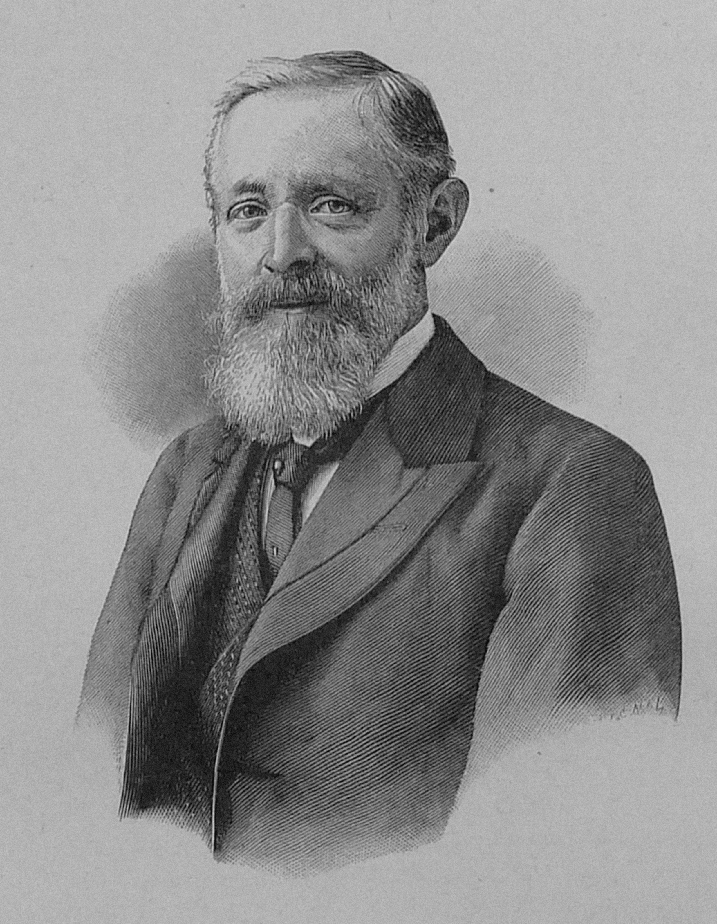 Eugène Girardet, gravure (détail) d'après photo dans Figures contemporaines Album Mariani tome XI, 1908. graveur indéterminé (signature illisible).